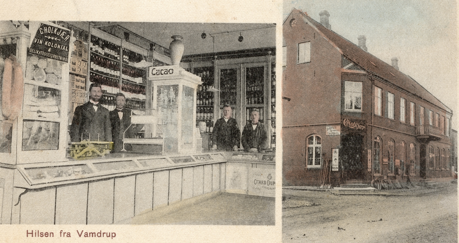 C. Holkjærs Kolonialhandel i Vamdrup. Købmand Holkjær blev i 1903 gift med Maria Dorthea Hugger fra Vamdrup og flyttede derfor til Vamdrup og åbnede sin kolonialhandel. Det må formodes, at købmanden selv er en af mændene på billedet, og derudfra kan vi så gisne om, hvornår billedet er optaget. PS - Den lille dreng på billedet kan vel formodes at være købmandens søn, Chr. Jens Holkjær, som er født i 1904, og han er maksimalt 10 år, så vi er før første verdenskrig.